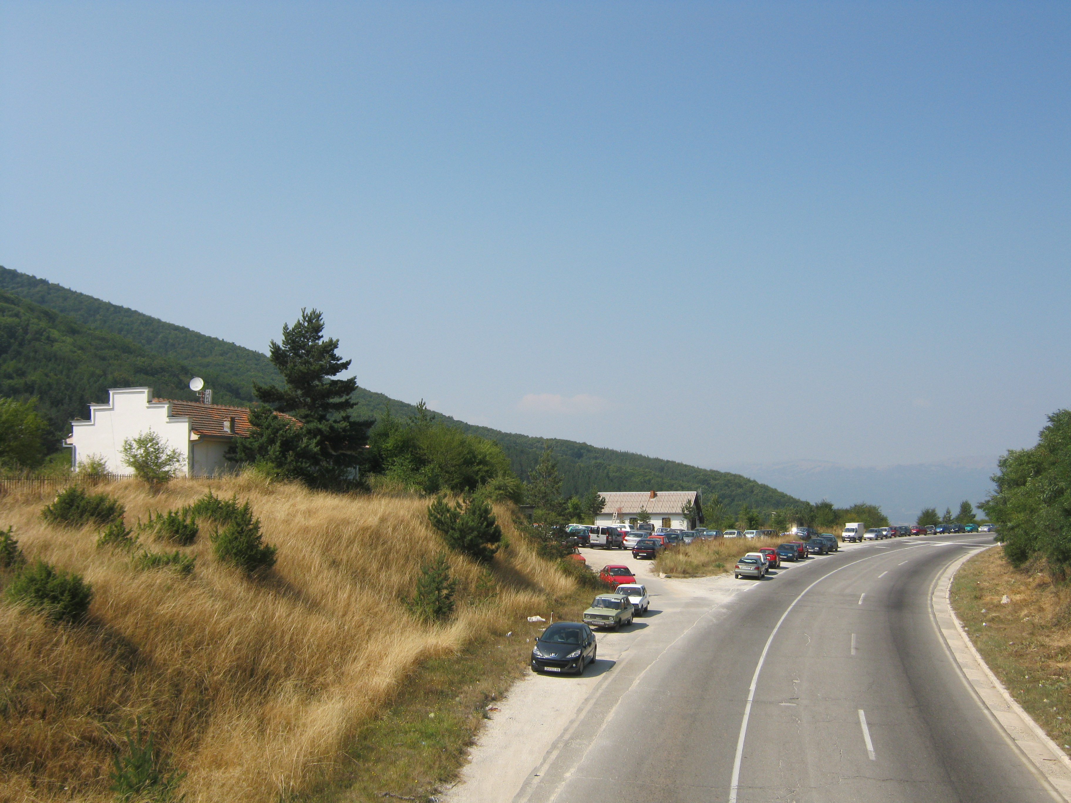 Превој Ѓавато простор каде порано било стационирано с.Ѓавато